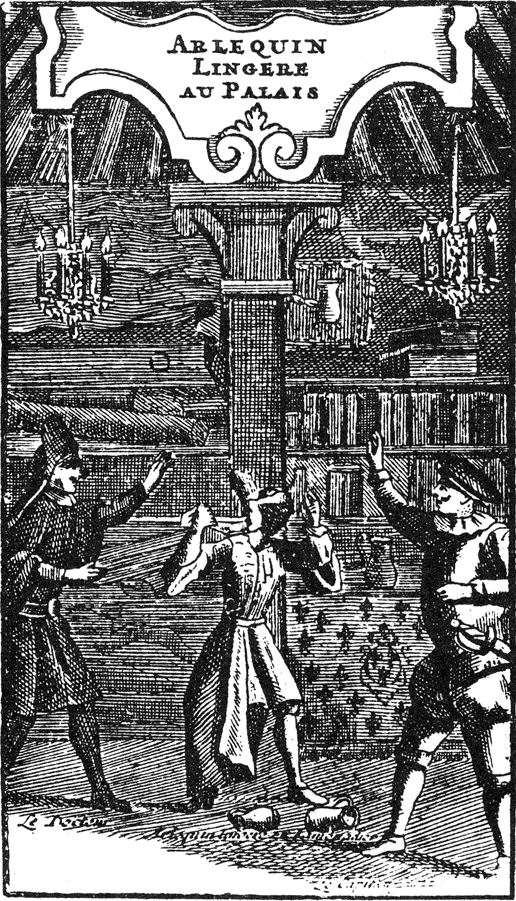 Illustration of Anne Mauduit de Fatouville's Arlequin lingère au palais